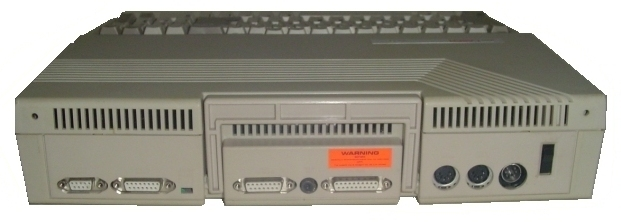 VTC Laser 128 - traseira